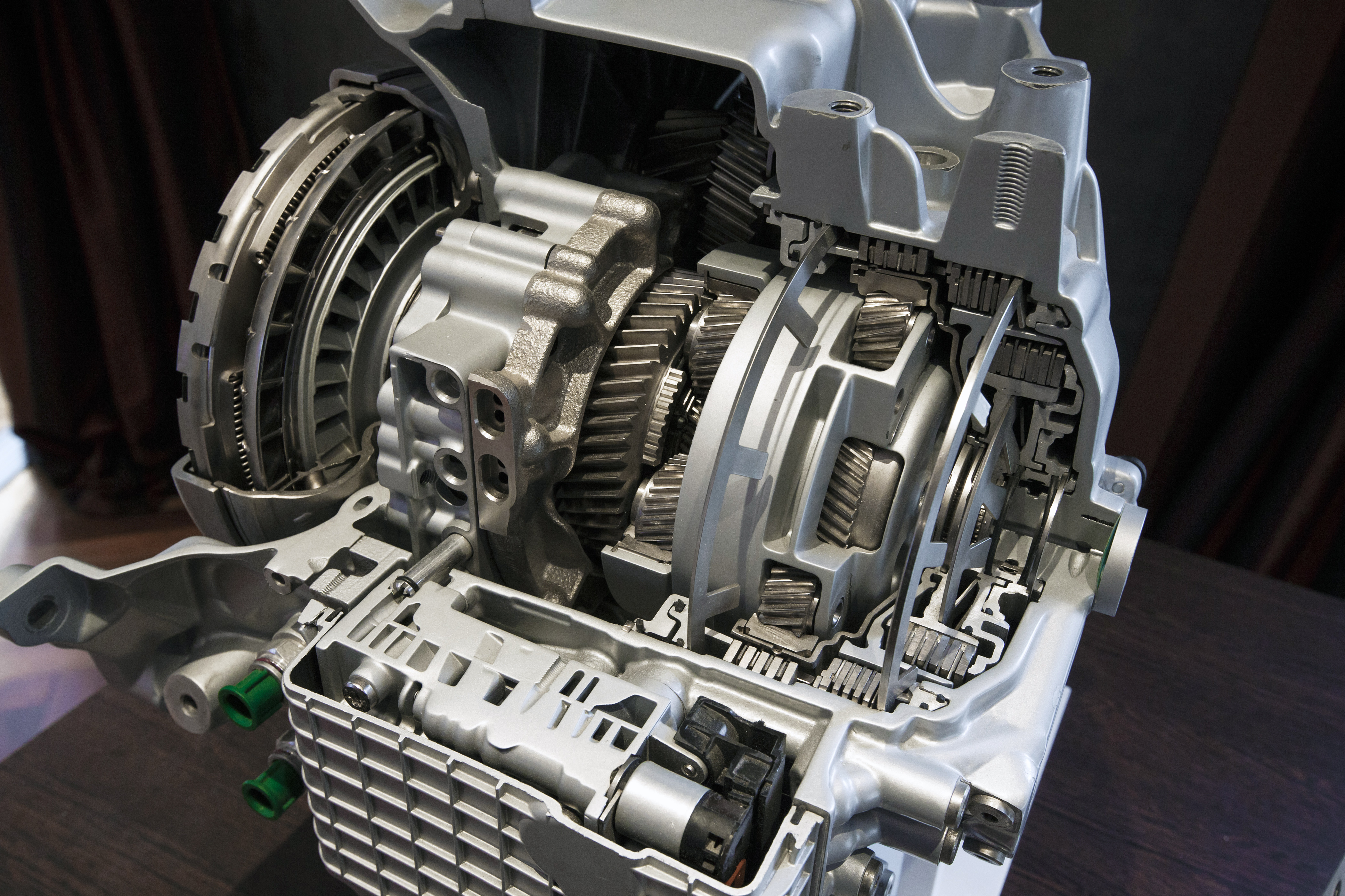 Geneva media drives | 2013